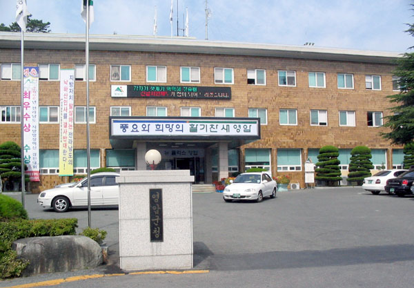 전라남도 영암군청의 모습.